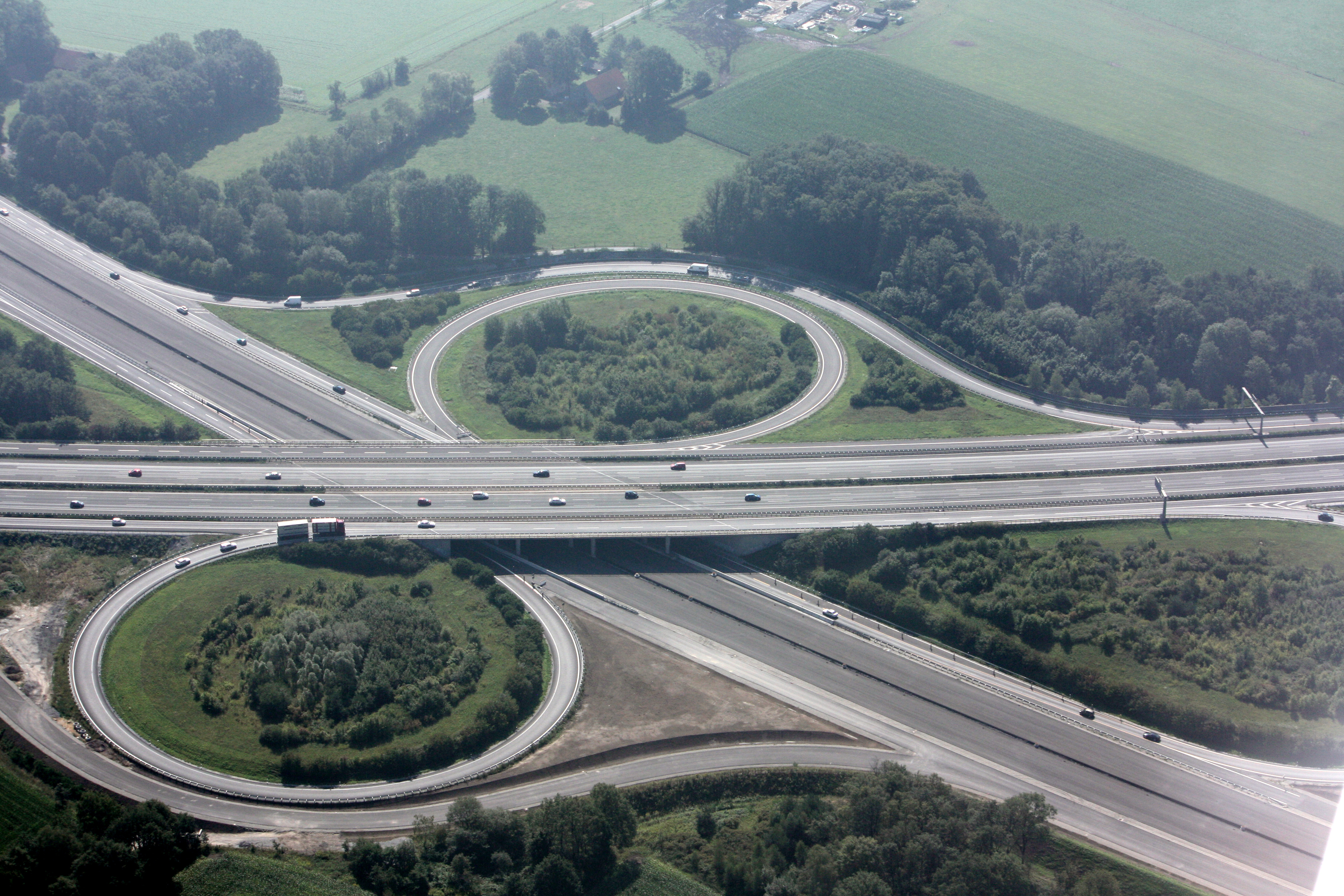 Kreuz Bielefeld A2 / A33 Links Richtung Hannover, rechts Richtung Dortmund, links-oben Richtung Paderborn